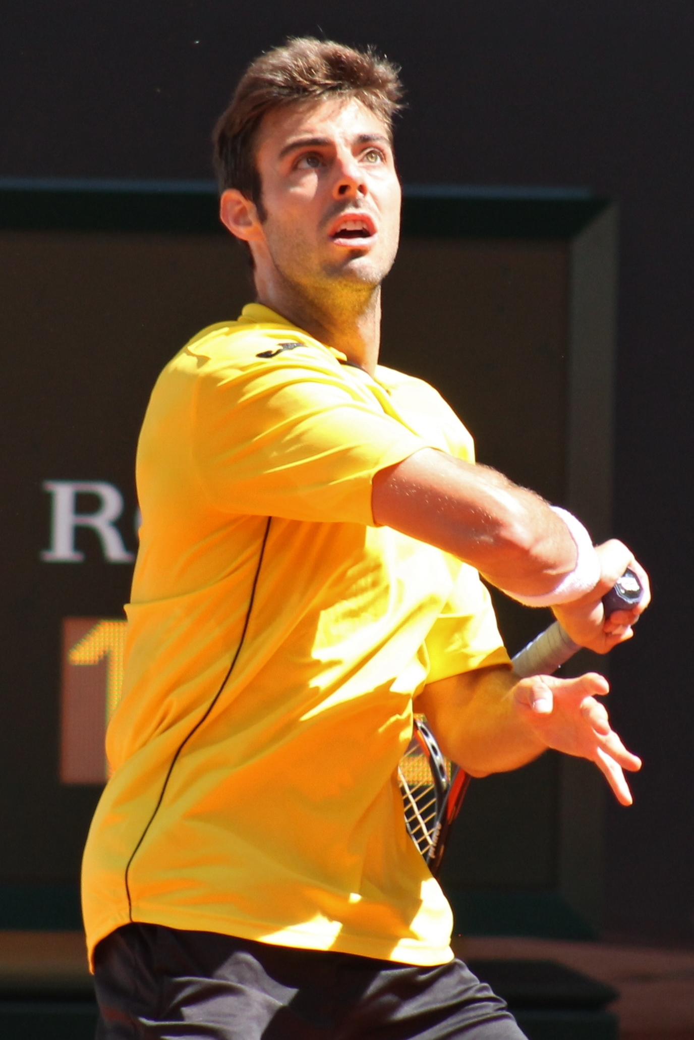 Granollers MA14 (15)